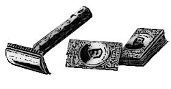 eigen werk, op basis van een tijdschriftadvertentie uit de jaren 1920